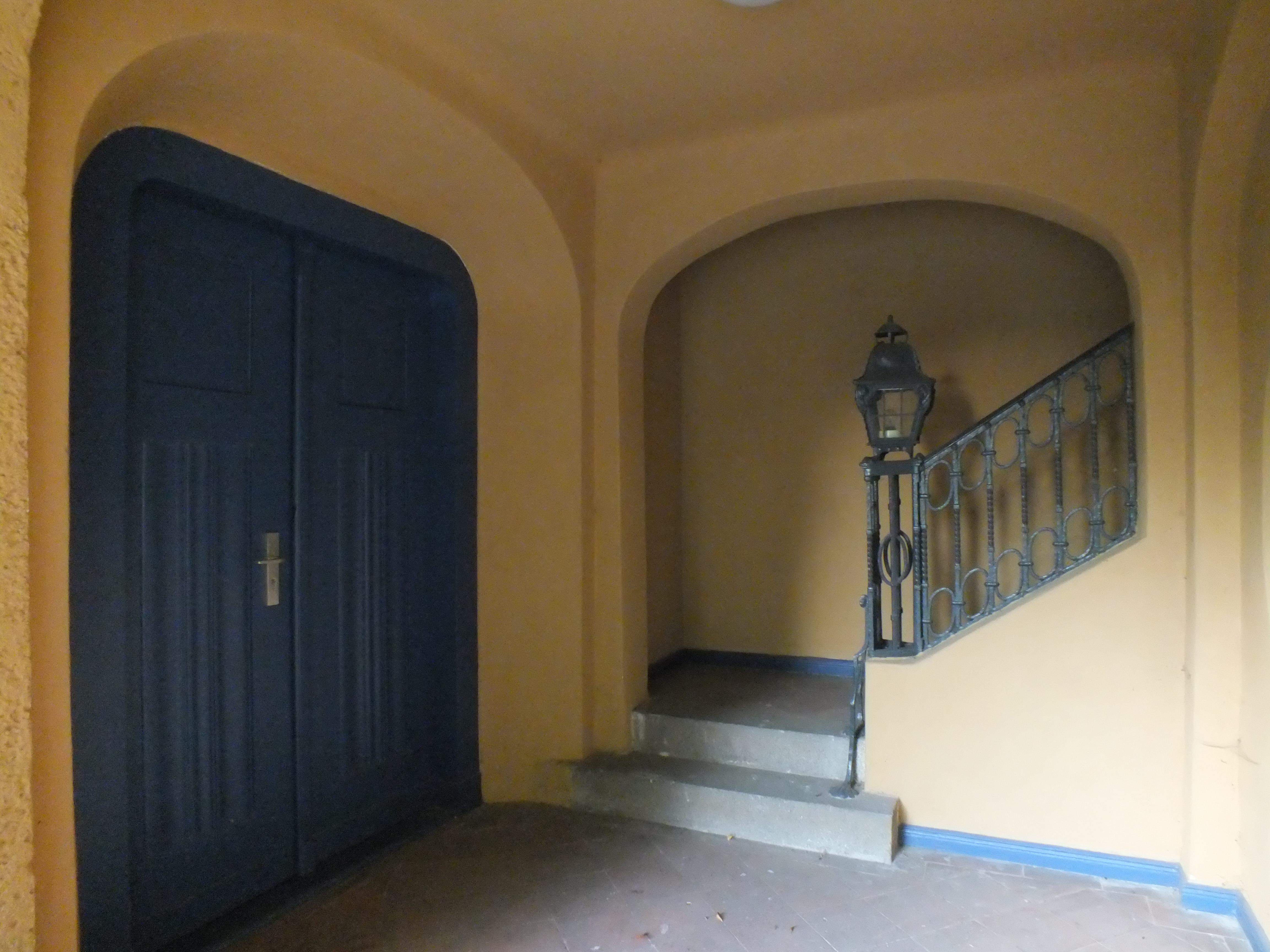 Straße in Berlin-Rahnsdorf, Friedhof Rahnsdorf; Friedhofskapelle